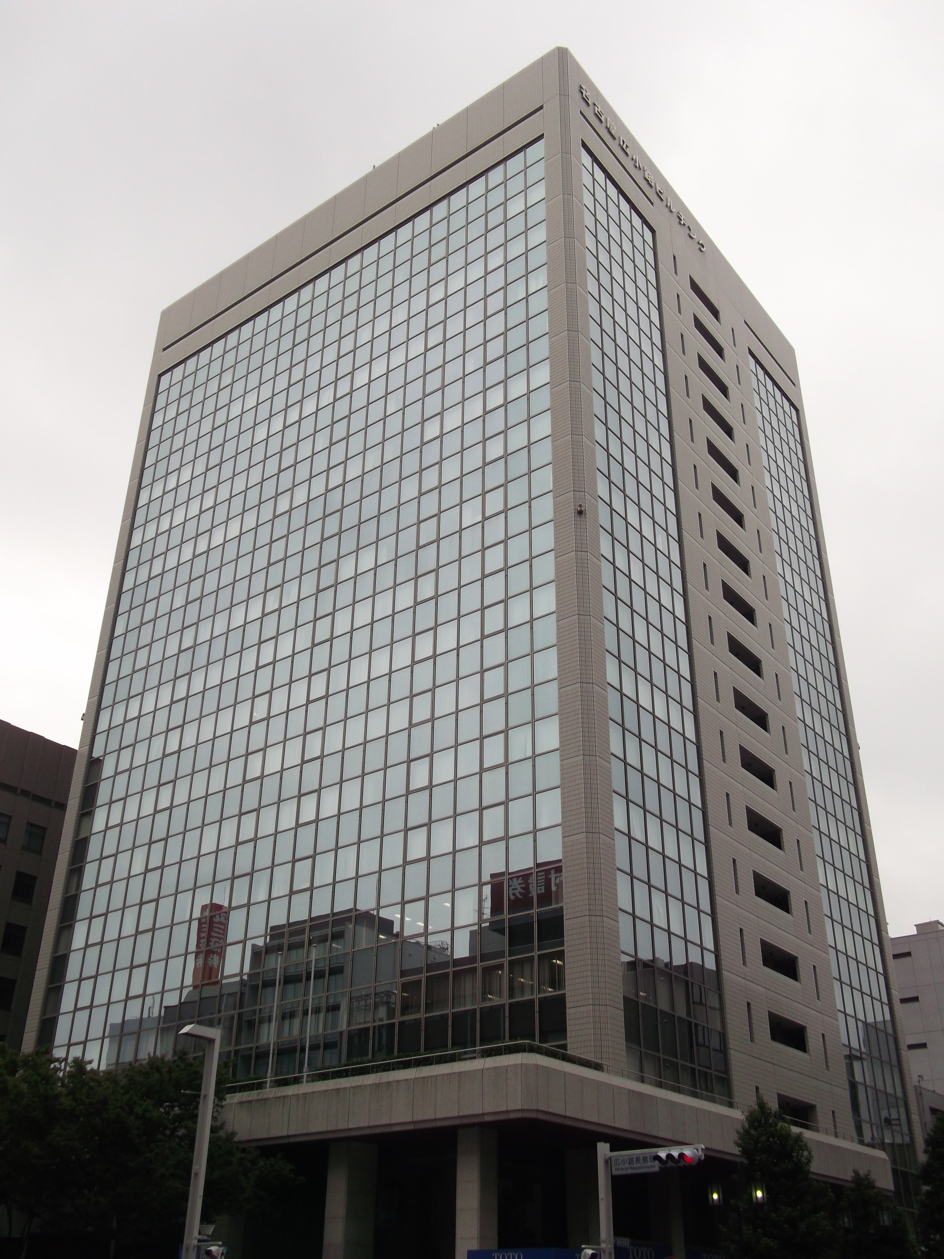 名古屋市中区の名古屋広小路ビルヂングを北側公道西側より撮影